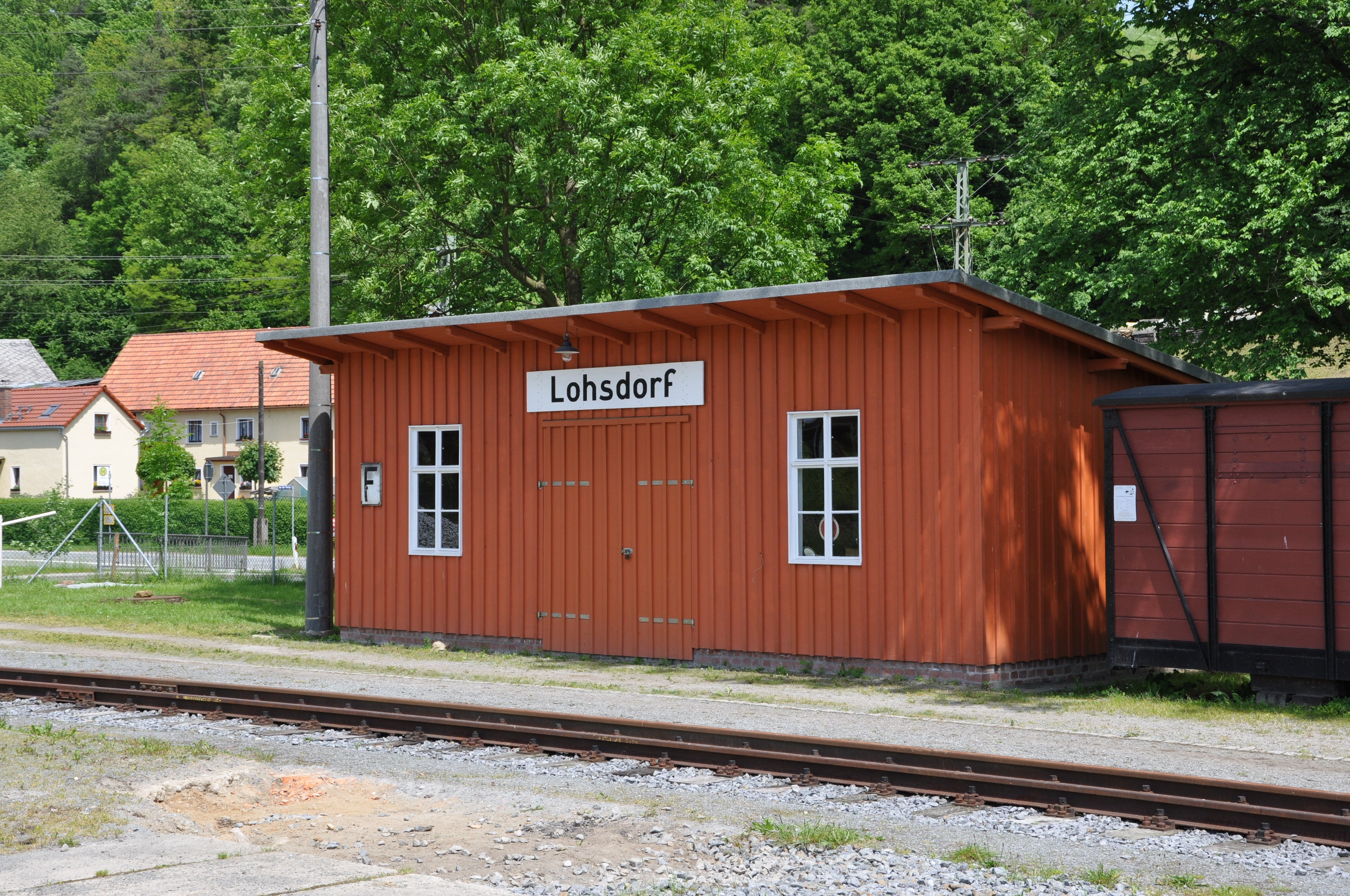 Bahnhof Lohsdorf der ehemaligen Schwarzbachbahn